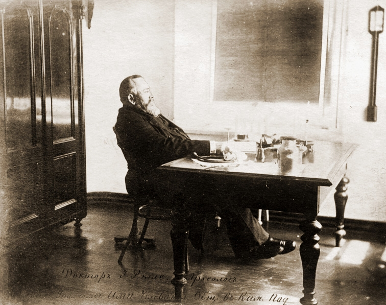 Категорія:Зображення Józef Apolinary Antoni Rolle (1830-1894) - Polish physician and writer